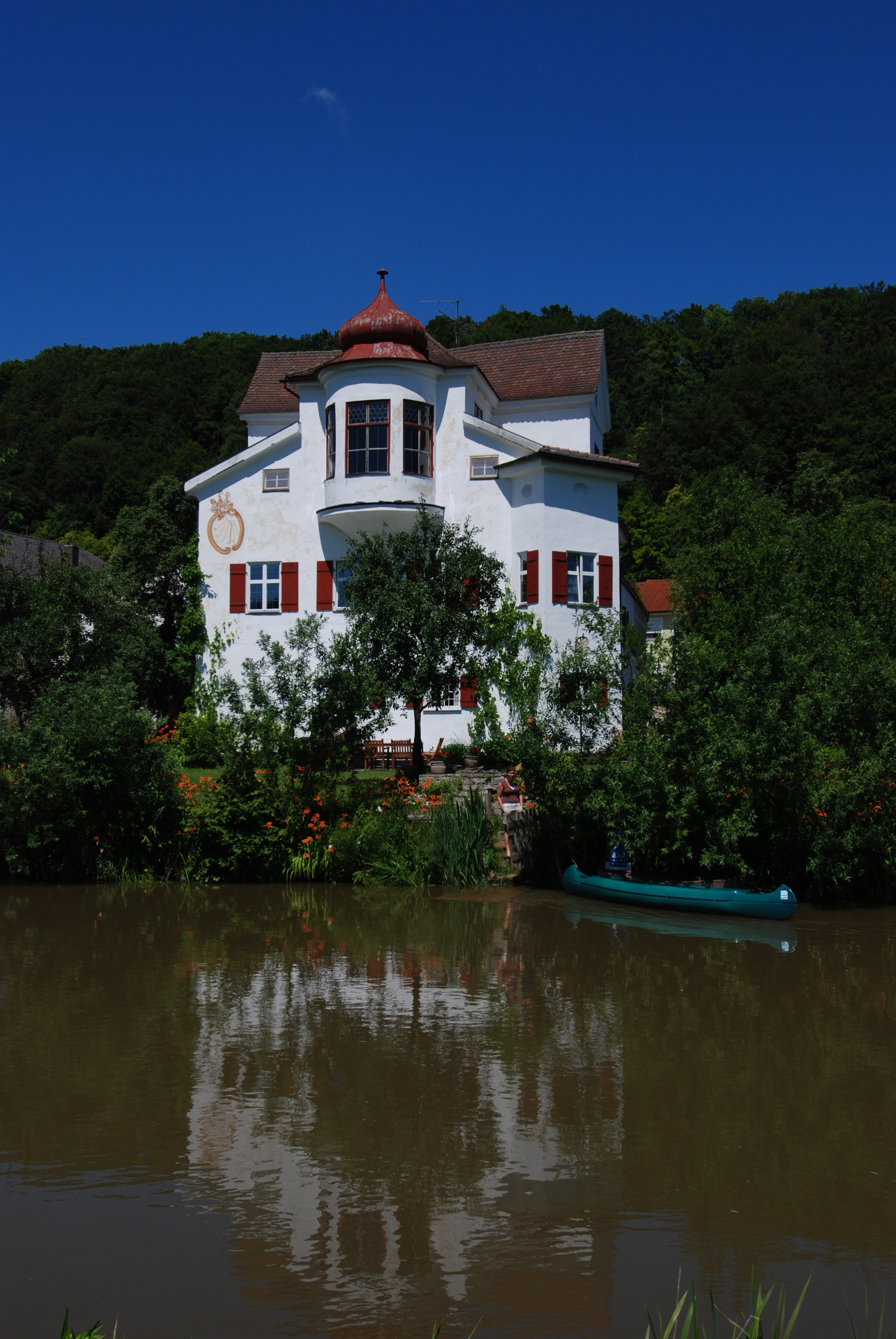 Schlossgut Inching im Altmühltal